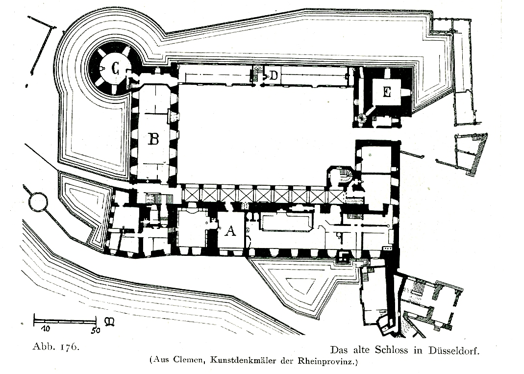 Altes Schloss in Düsseldorf, Grundriss. Flügel A ist der älteste Teil. Flügel B mit Rundturm C im 13. Jahrhundert hinzugefügt. Flügel D mit viereckigem Südostturm E aus dem 15. Jahrhundert